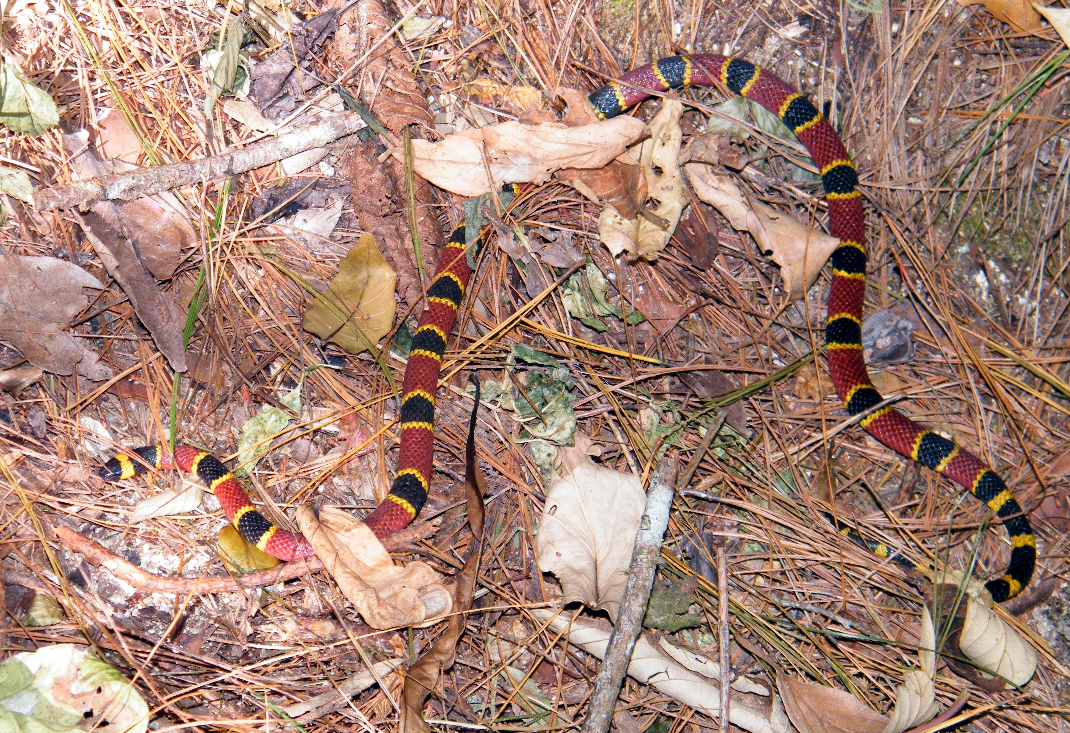 Reserva de la biosfera El Triunfo